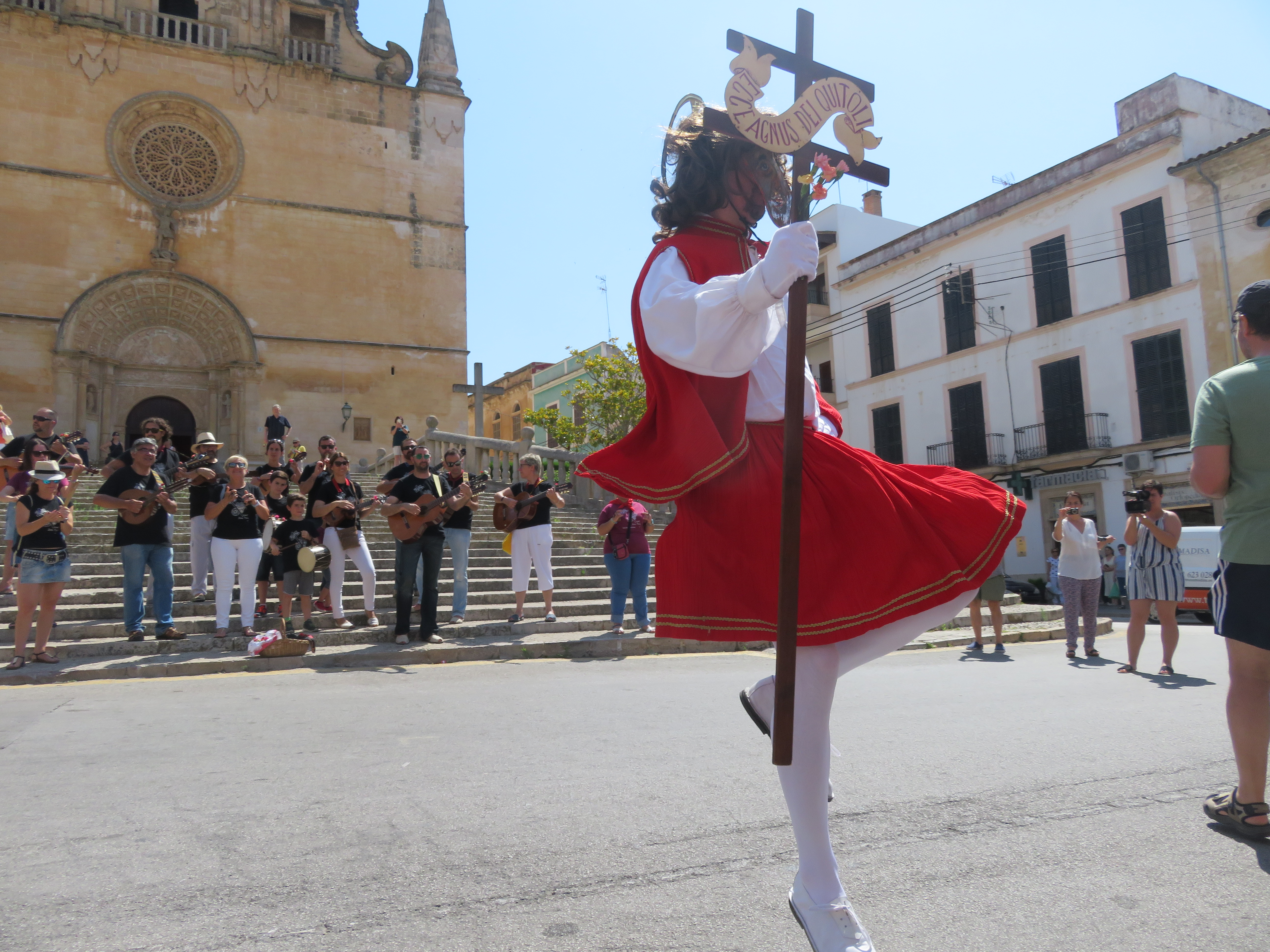 Sant Joan Pelós ballant davant la Parròquia de Sant Miquel de Felanitx This is a photography of a Folklore festival in Spain (Wikidata id Q23663605).